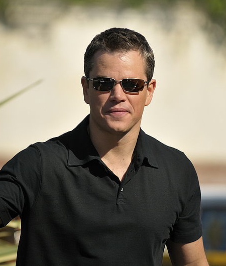 66ème Festival du Cinéma de Venise (Mostra), 6ème jour (07/09/2009) Matt Damon (et sa femme) avec Steven Soderbergh : leur arrivée au Lido